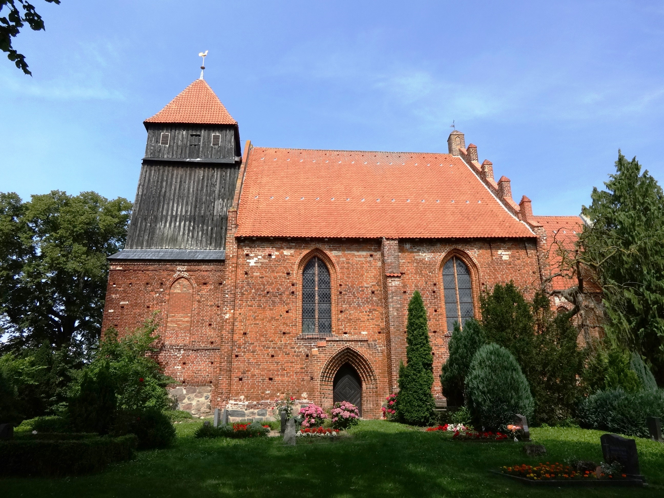 Dorfkirche Reinberg, Backsteinbau aus dem 13. Jahrhundert in der Gemeinde Sundhagen, Vorpommern-Greifswald, Mecklenburg-Vorpommern